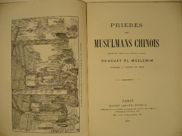 couverture du livre de René Basset, "prières des musulmans chinois", 1878